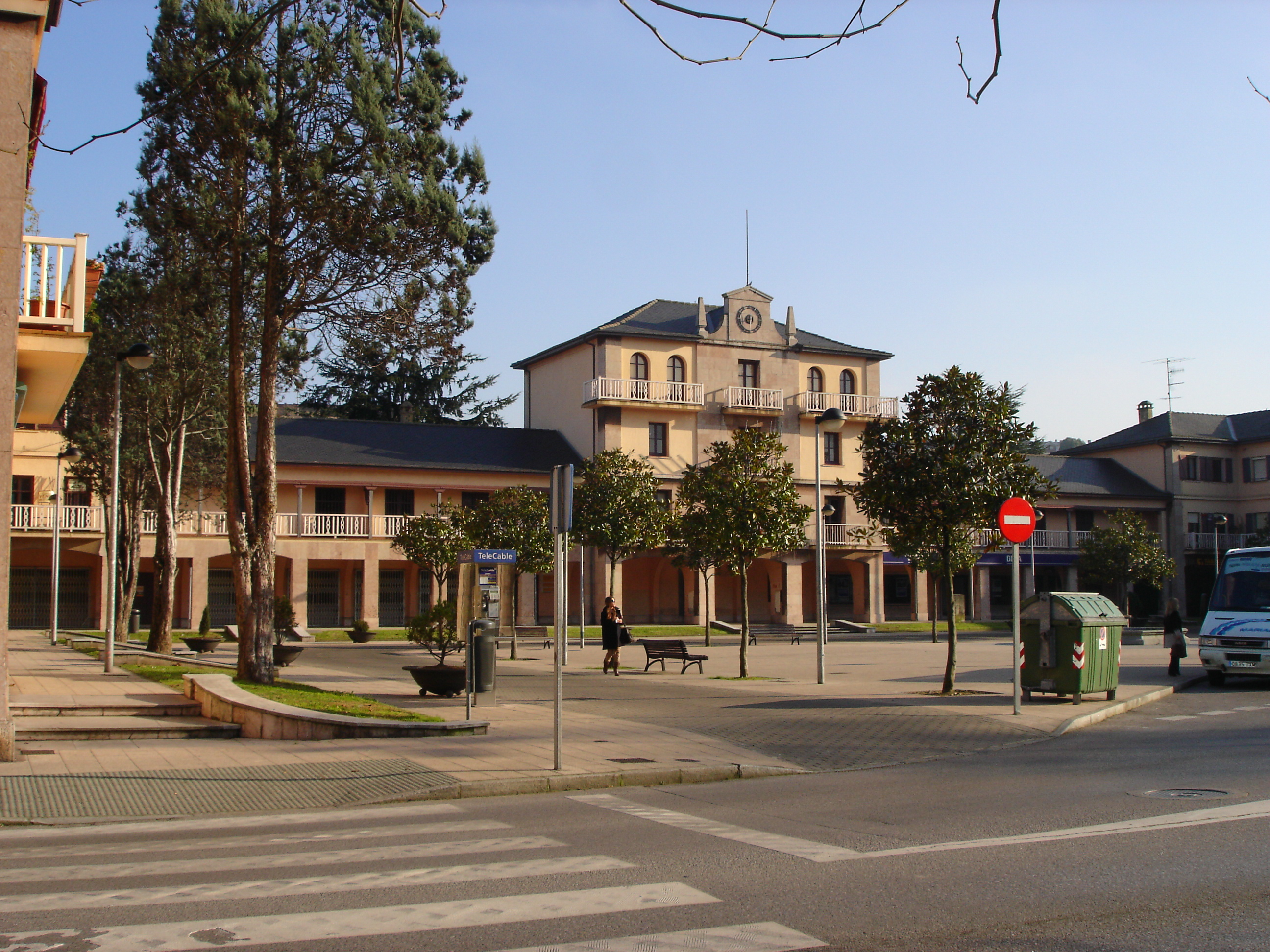 Plaza Mayor de Llaranes. Epicentro de la vida del poblado obrero. Obra de Juan Manuel Cárdenas y Francisco Goicoechea.